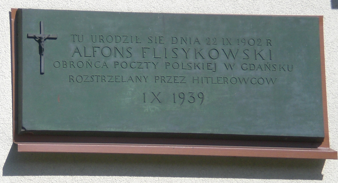 Goręczyno - tablica poświęcona Alfonsowi Flisykowskiemu